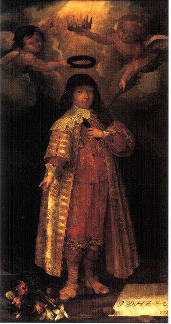 Johann Wilhelm, Sohn von Wilhelm